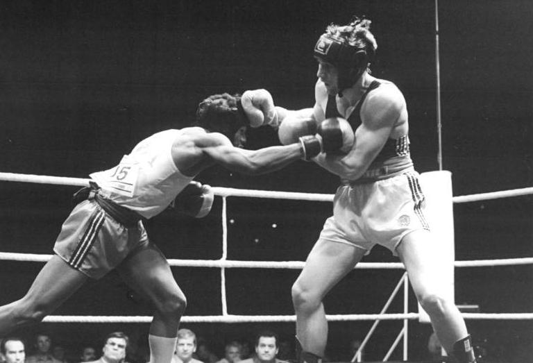 Delvis Ramirez, Michael Timm ADN-ZB Settnik 6.10.85 Berlin: XVI. Internationales Boxturnier von Berlin-Das spannendste Gefecht lieferten sich vor 5.000 Zuschauern der zweite Halbfinalserie im Halbmittelgewicht Europameister Michael Timm (DDR, r.) und Kubas Vizemeister Delvis Ramirez, der das Geschehen mit einer großen kämpferischen Leistung bis zum Ende offen hielt und nur knapp nach Punkten unterlag.